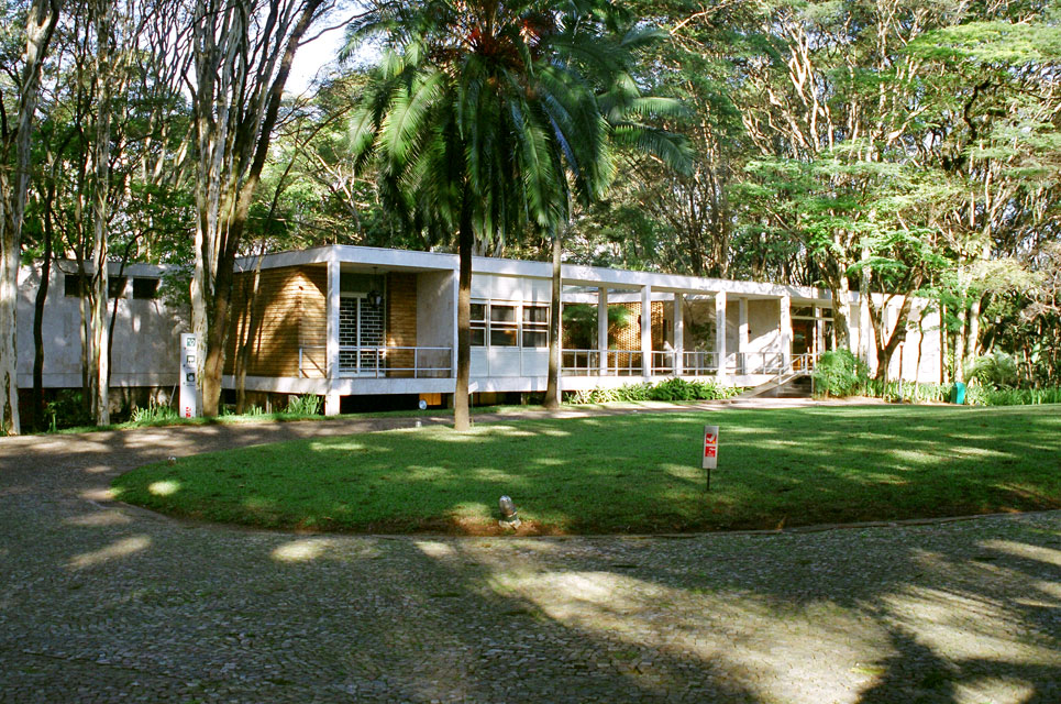 Fundação Maria Luisa e Oscar Americano, projeto de Oswaldo Bratke